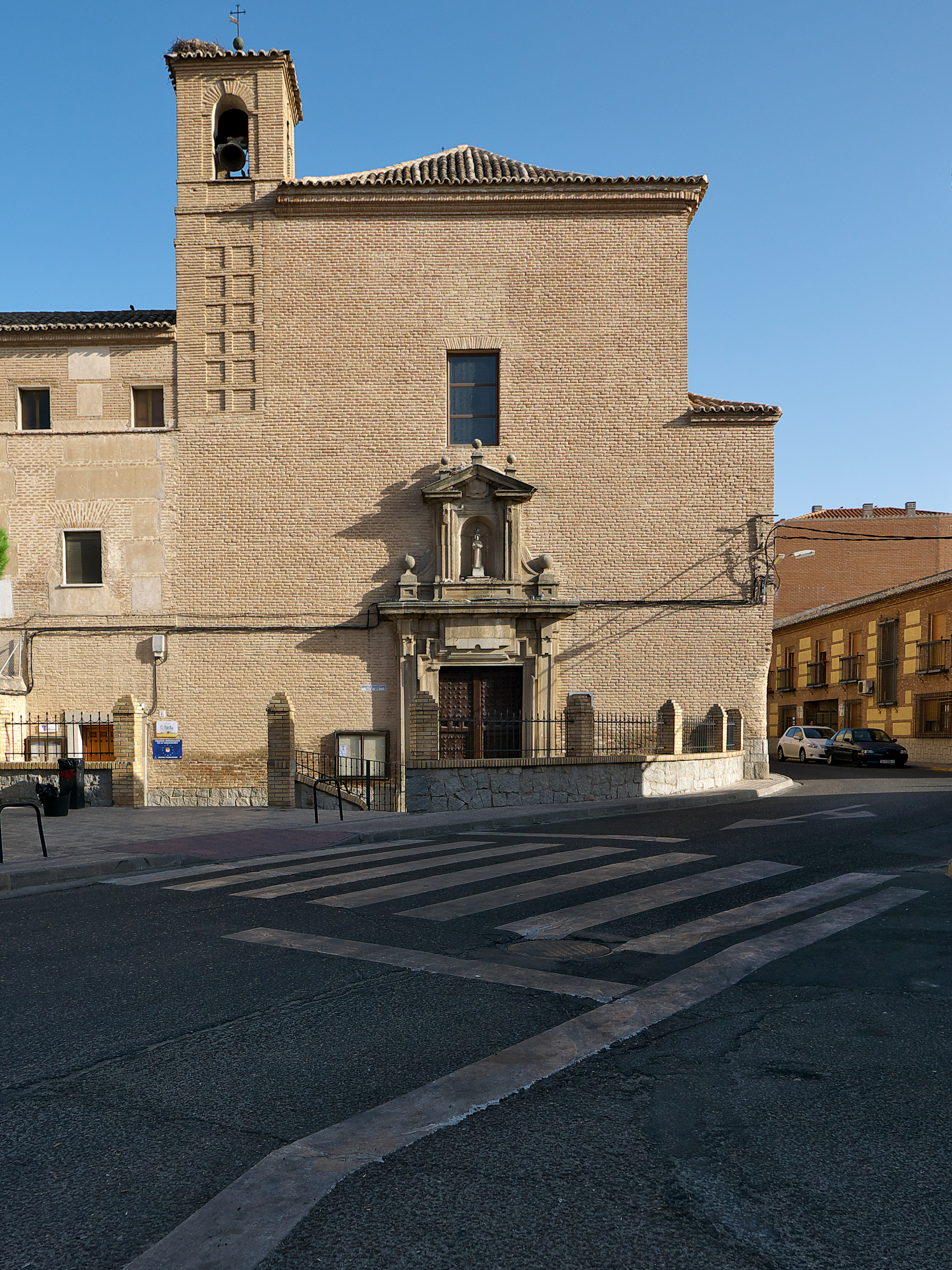 Institución fundada por Catalina Pacheco Vélez de Guevara (h. 1560)